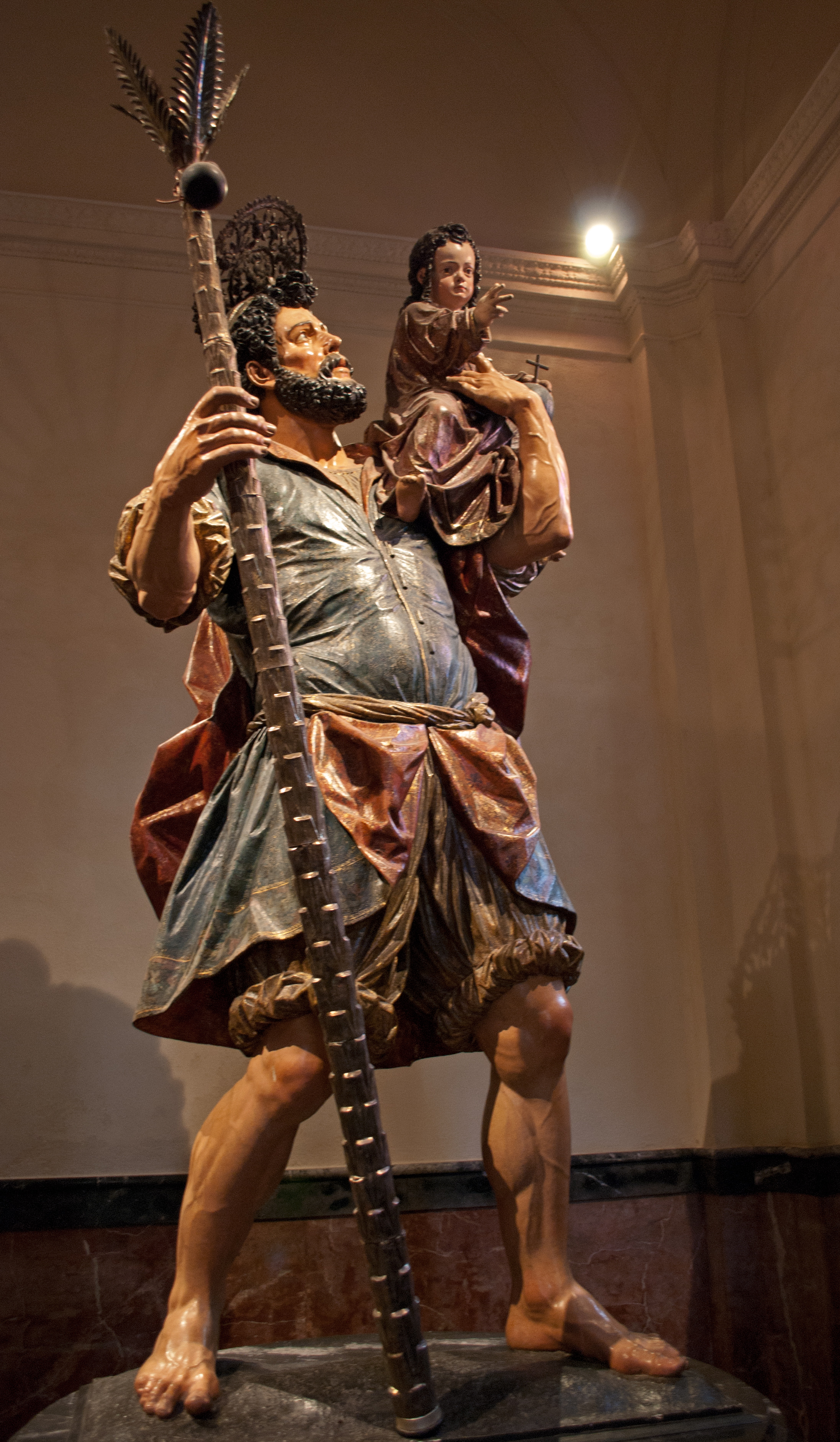 Escultura de San Cristobal, Iglesia del Salvador de Sevilla, año 1597, autor Juan Martínez Montañés